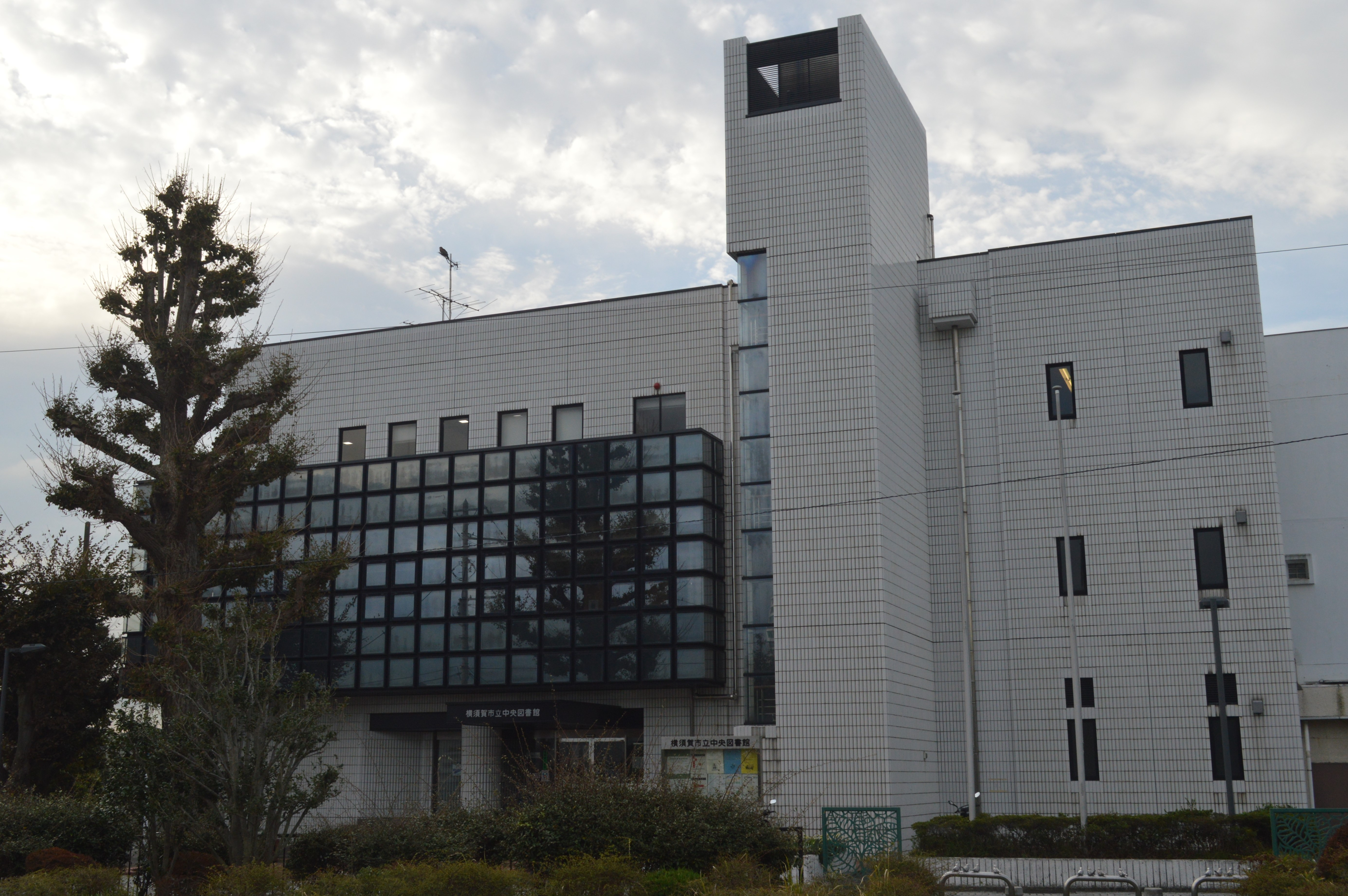 神奈川県横須賀市の横須賀市立中央図書館。